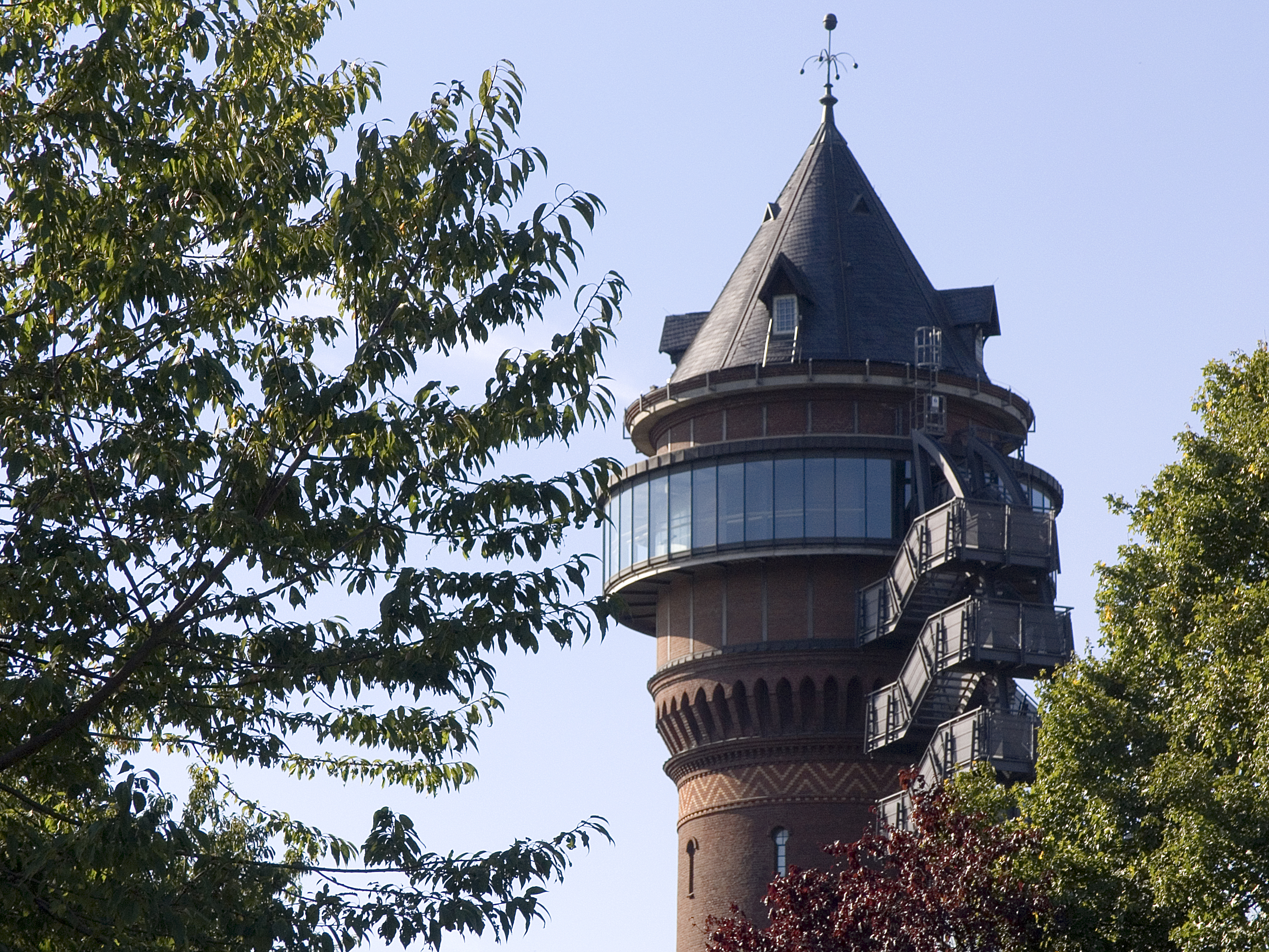 Aquarius Wassermuseum в г. Мюльхайм-на-Руре (Северный Рейн-Вестфалия)